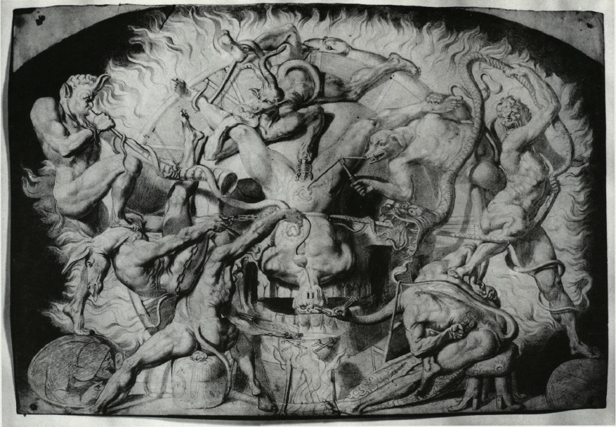 Die sieben Todsünden, Bleistiftzeichnung, 33,5 x 49 cm, Innsbruck, Tiroler Landesmuseum Ferdinandeum